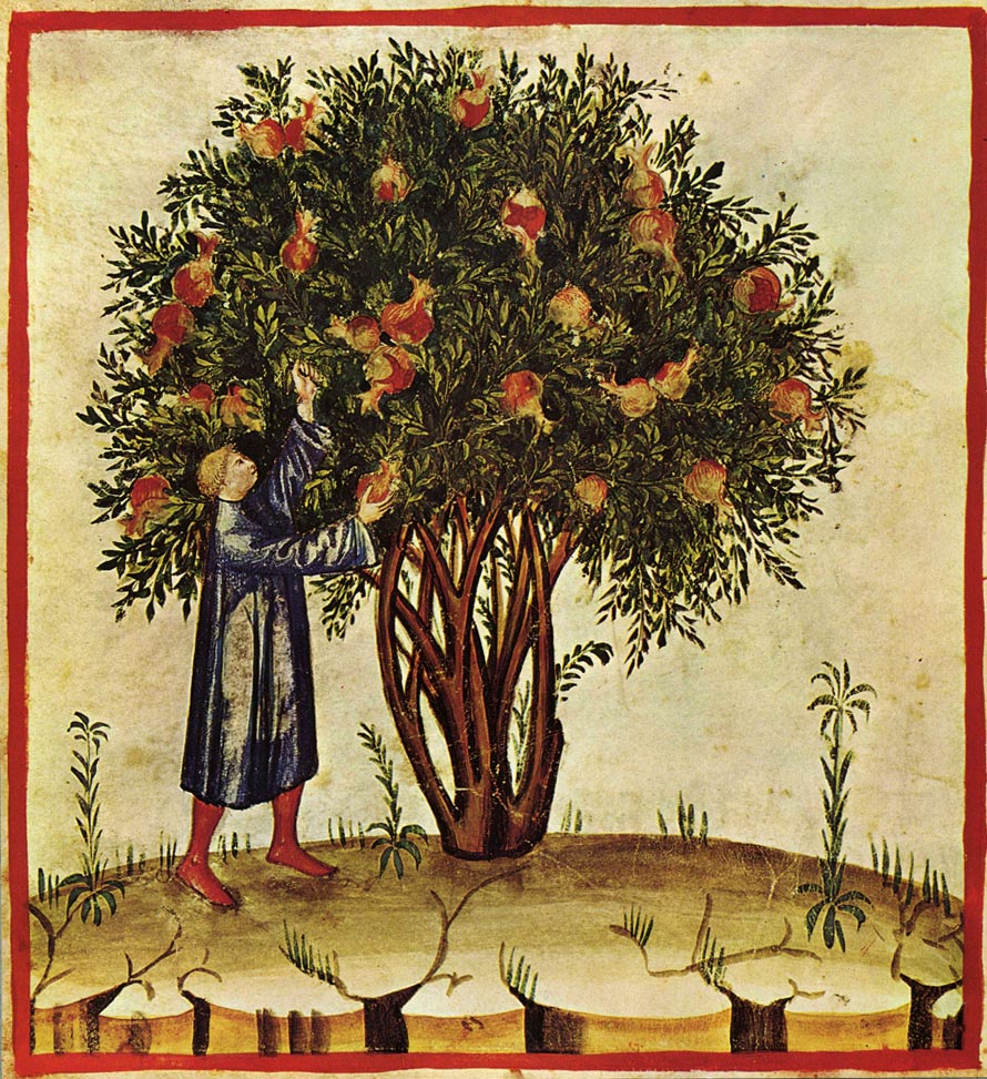 Tacuina sanitatis (XIV century)